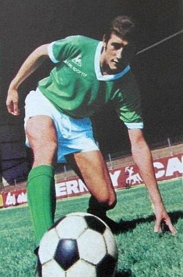 Patrick Revelli en 1971, 'Ageducatifs Football in Action 1971 - 1972', Panini figurina n°39.